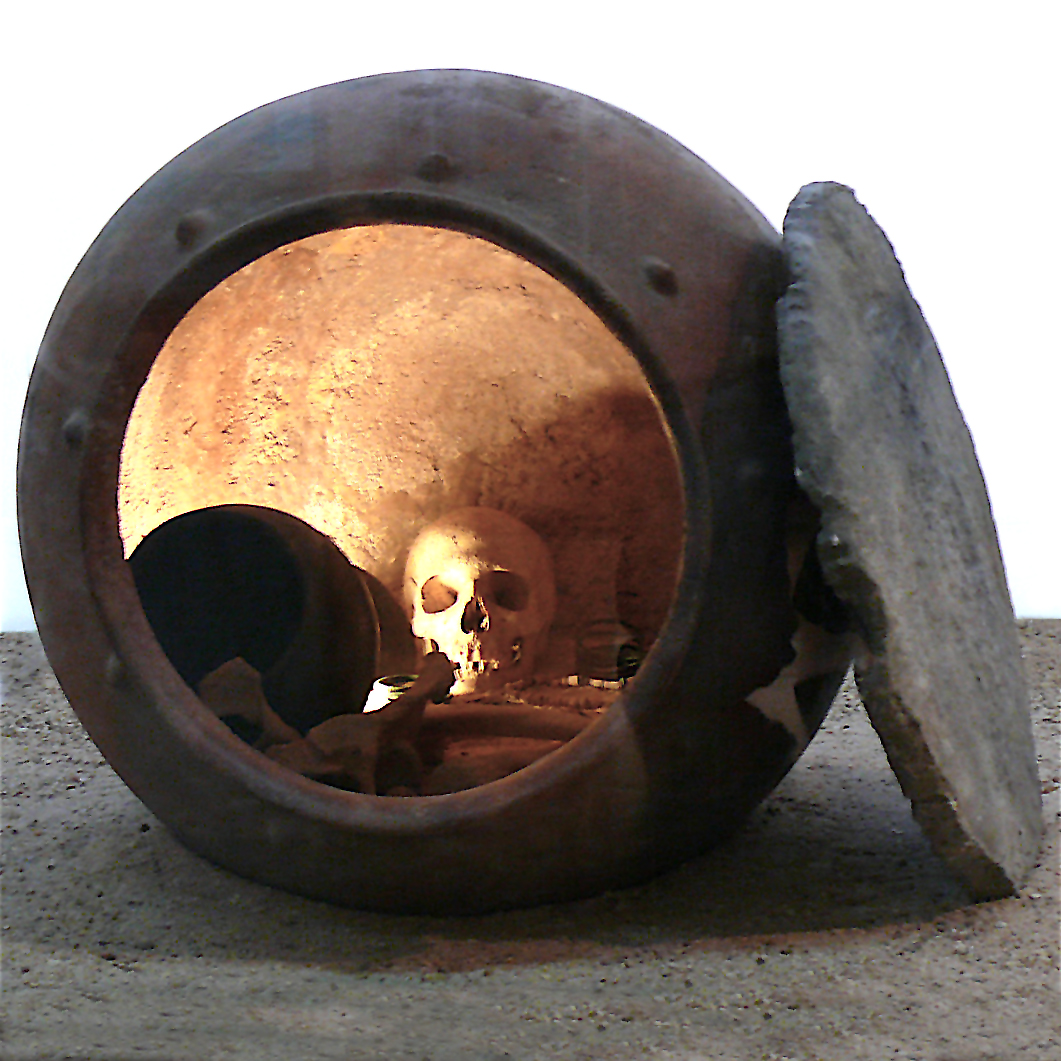 Enterramiento en tinaja típico de la segunda fase de la cultura de El Argar, Bronce Pleno en el sur de España